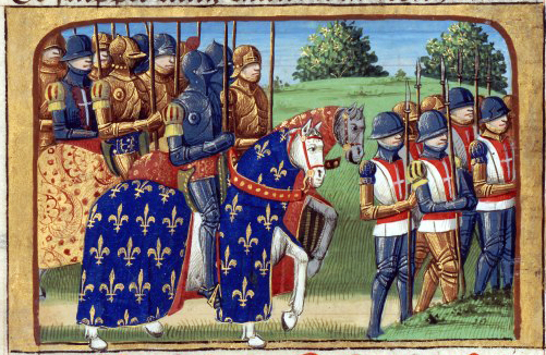 L'armée française en Normandie, par Martial d'Auvergne, enluminure issue de l'ouvrage Vigiles de Charles VII, Paris, France, XV°siècle.